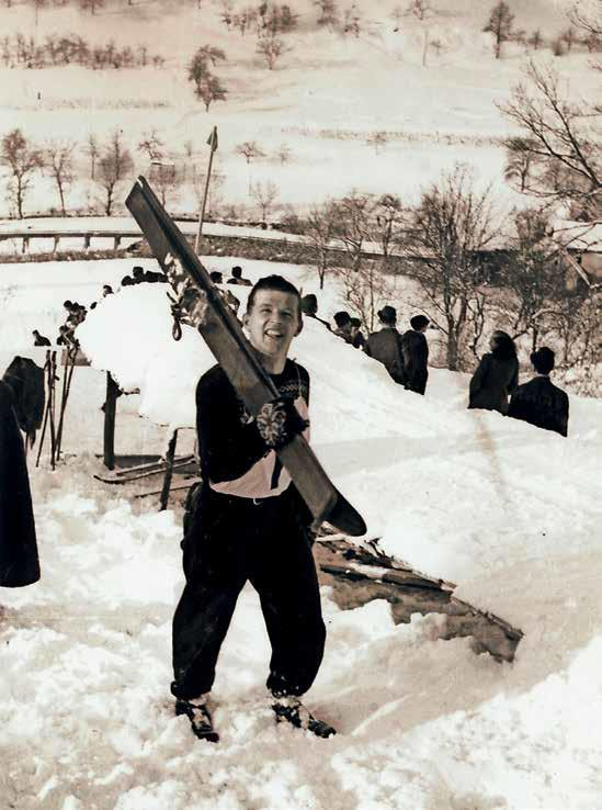 Rudi Finžgar na Partizanskah smučinah v Cerknem.